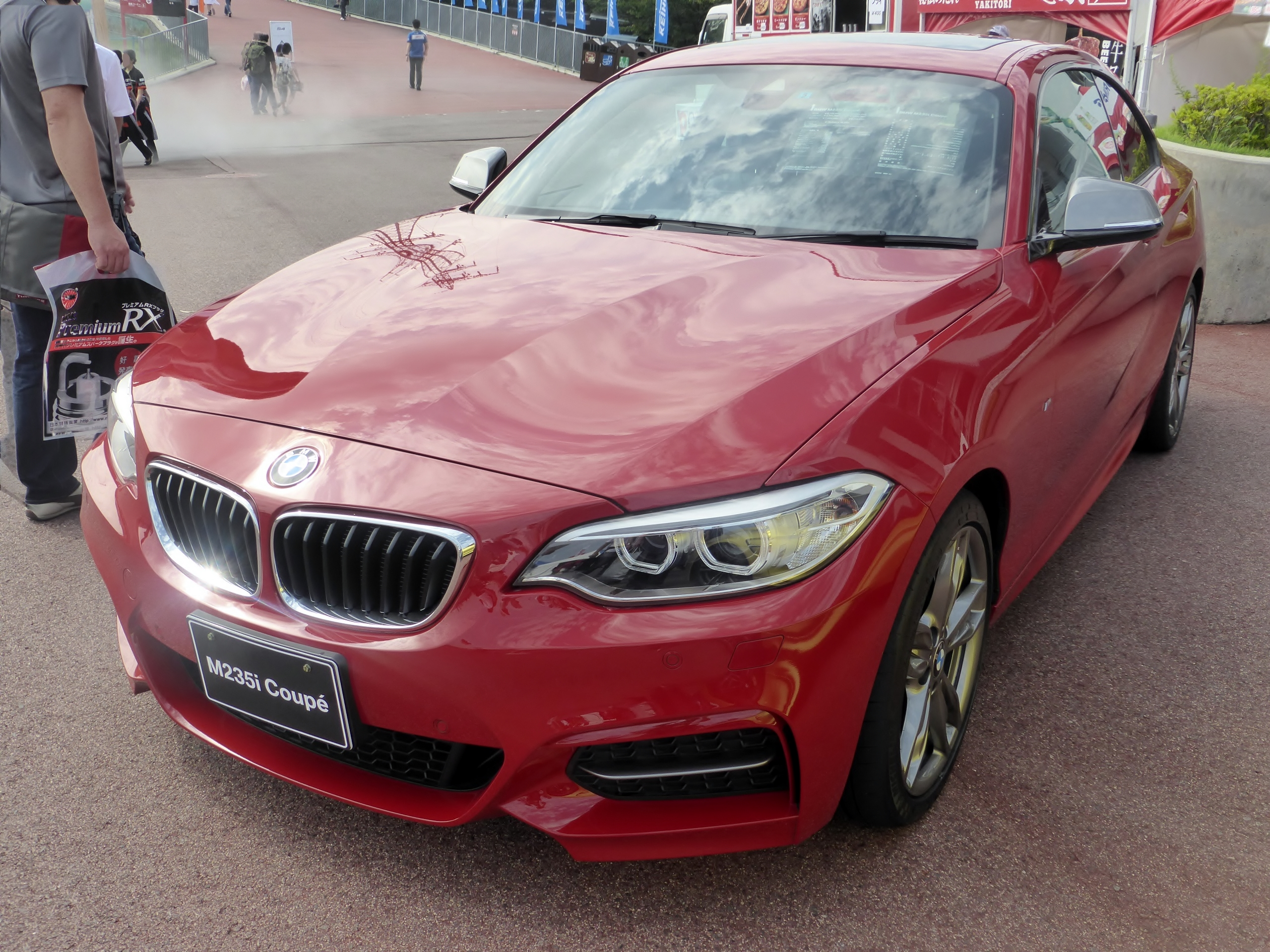 F22型BMW・M235iクーペをフロントから撮影。